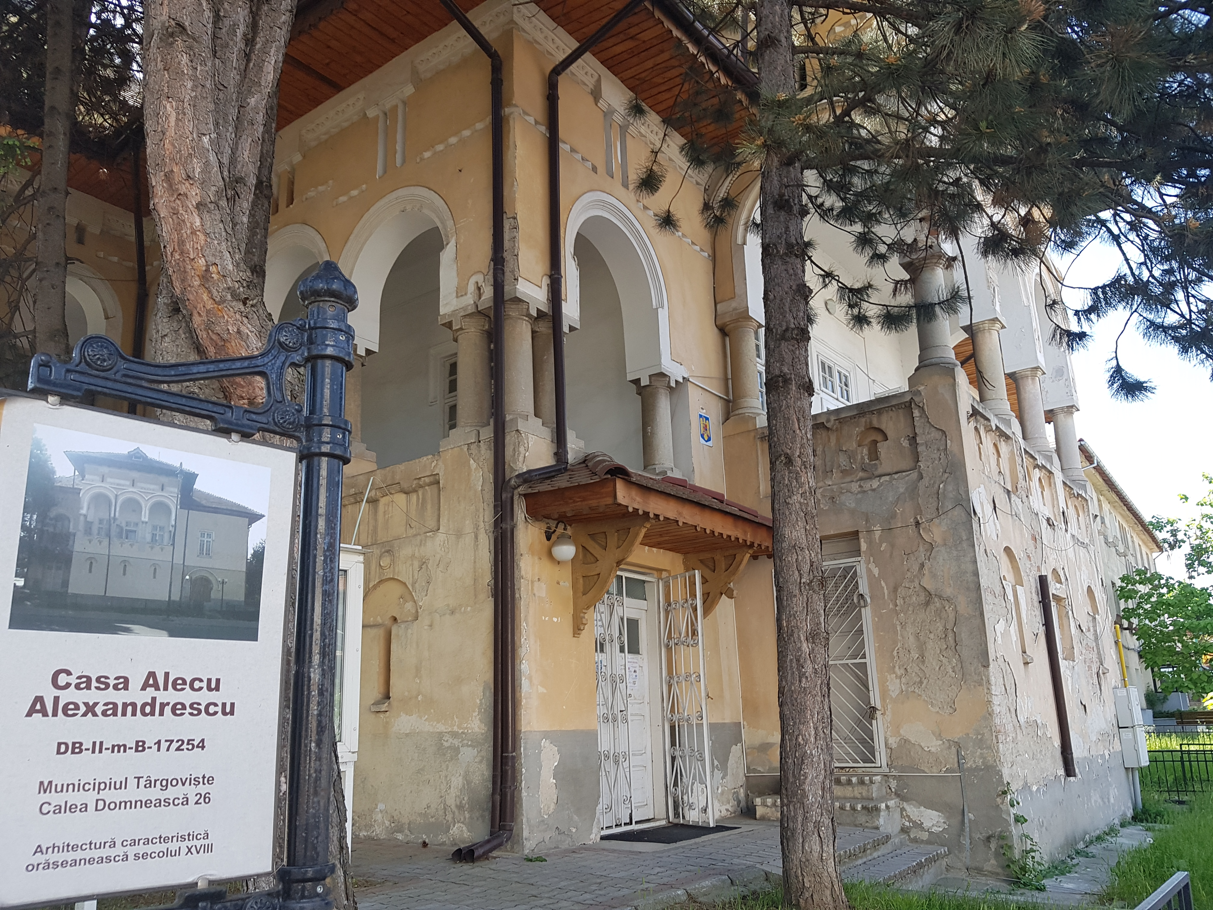 Casa Fusea - Pârvulescu